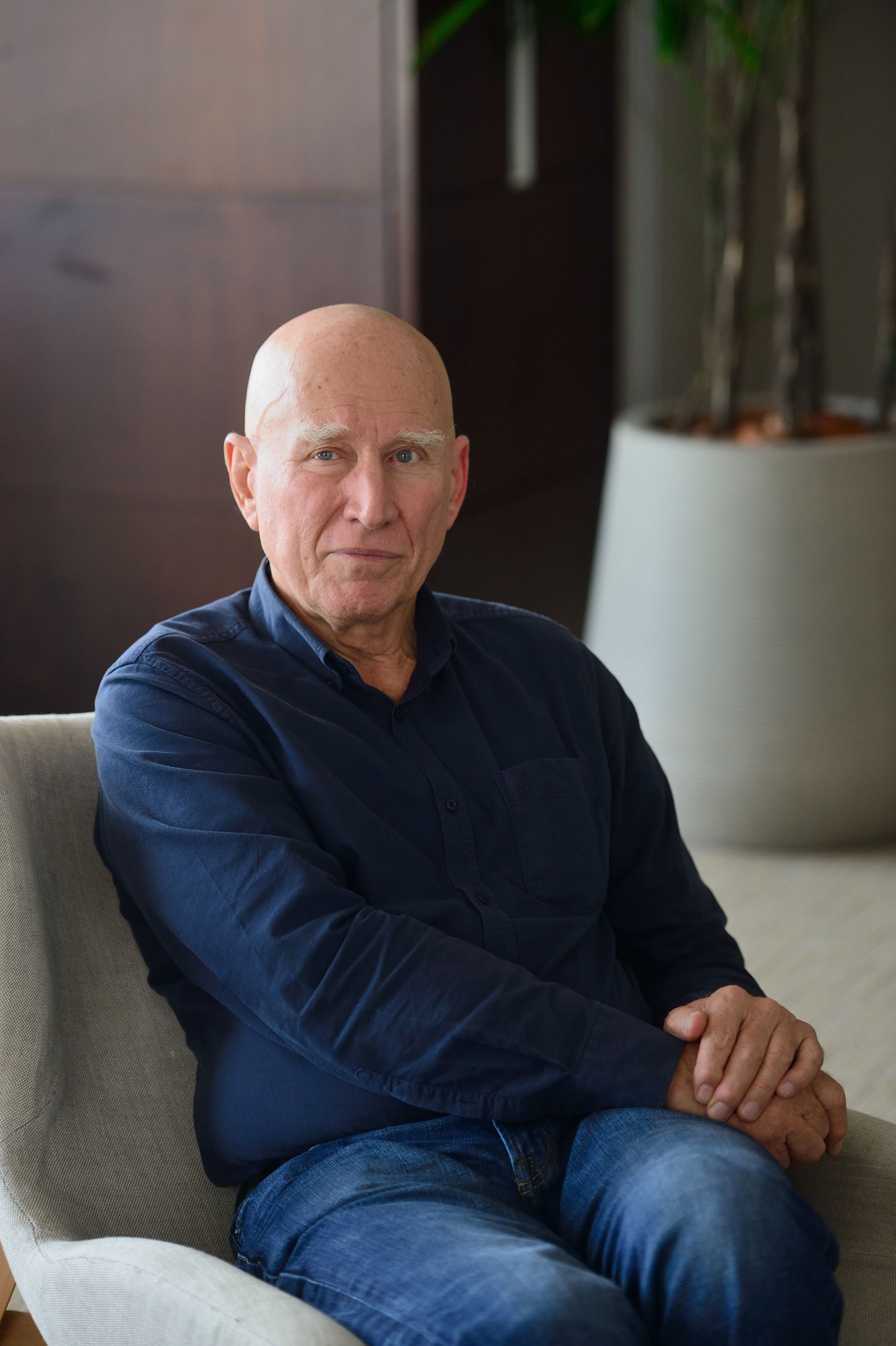 Rio de Janeiro - O fotógrafo e ambientalista Sebastião Salgado, fundador do Instituto Terra, fala sobre o Prêmio Personalidade da Câmara de Comércio França-Brasil